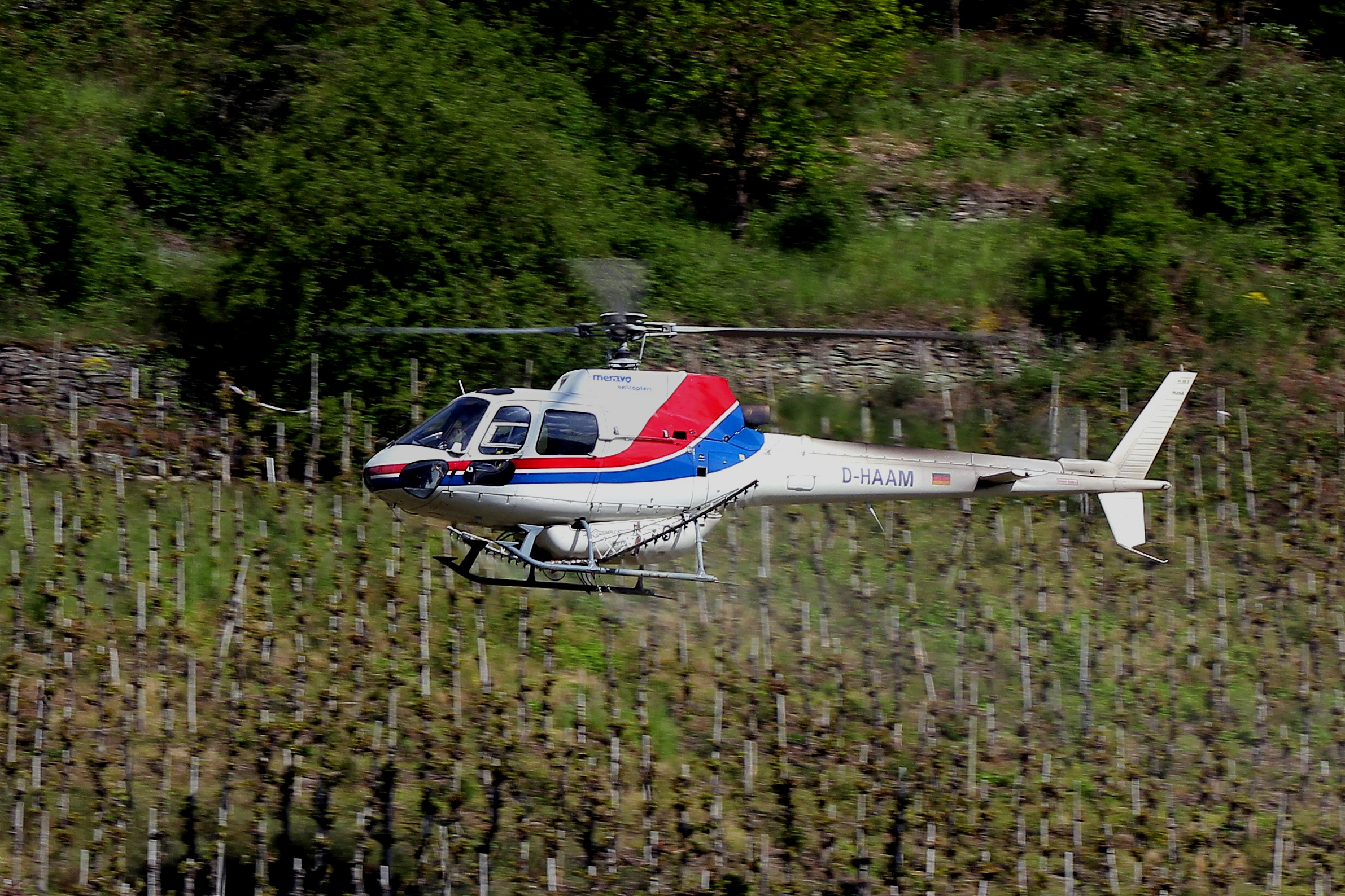 Eurocopter AS 350 BA bei der Schädlingsbekämpfung im Weinberg von Karden. Triebwerk: 1 Turbine Arriel 1B (641 PS), Länge 10,93 m, Rotordurchmesser 10,69 m. Dieser Hubschraubertyp wird seit 1992 gebaut.